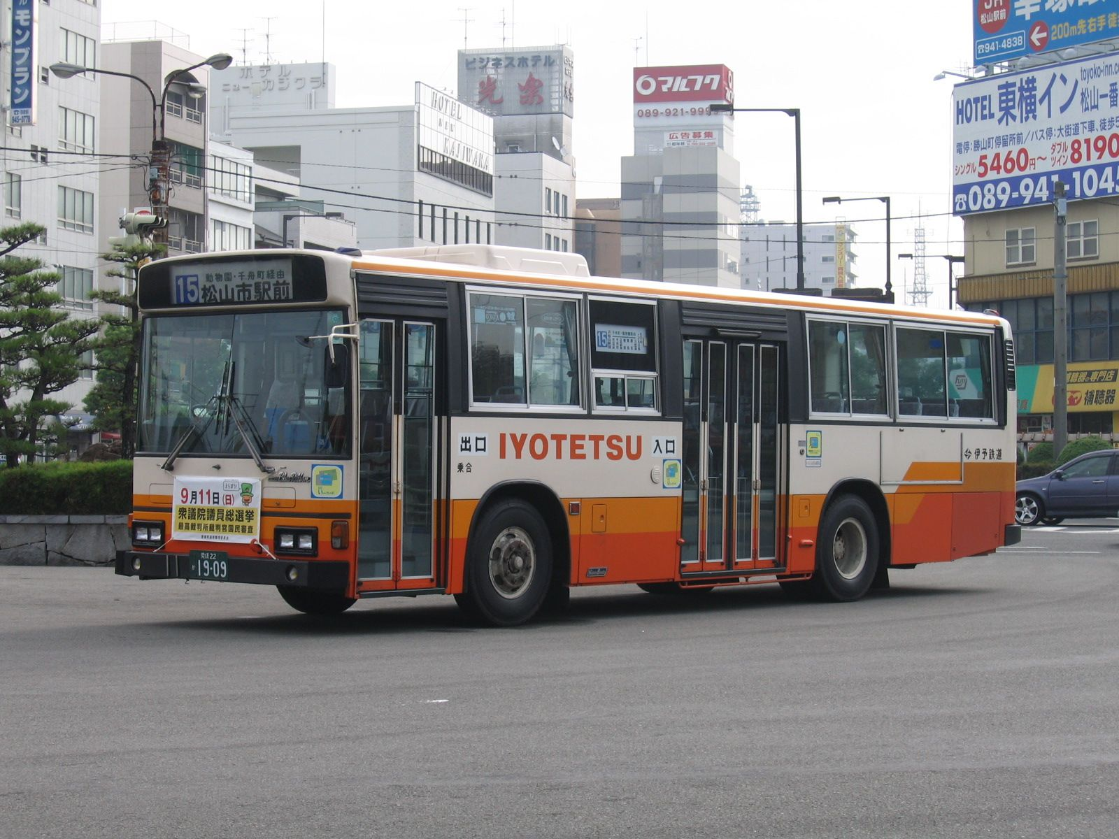 日野自動車 ブルーリボン 伊予鉄道 愛媛22か19-09 撮影場所 JR四国 松山駅 撮影者 Fuji-s本人撮影 撮影日 2005年8月31日